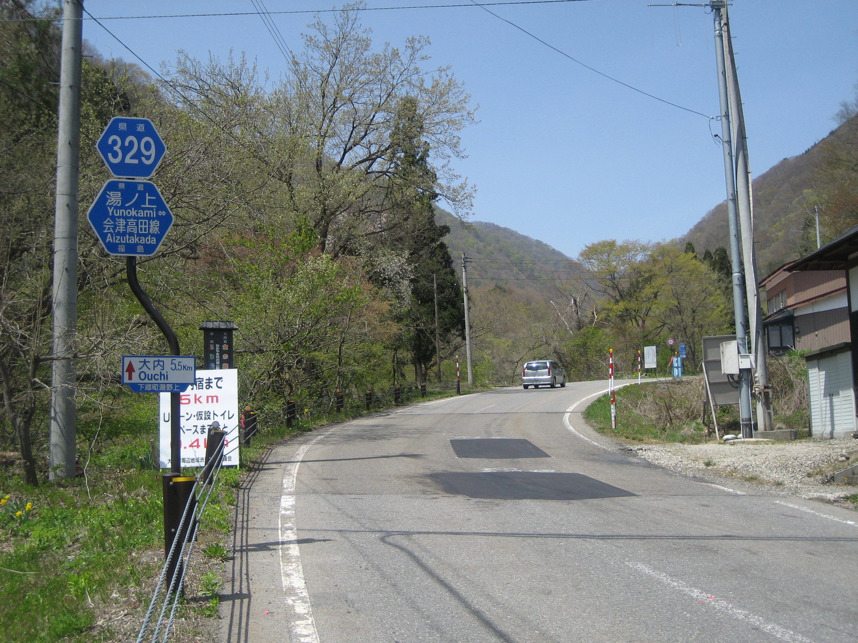 福島県道329号線下郷町内